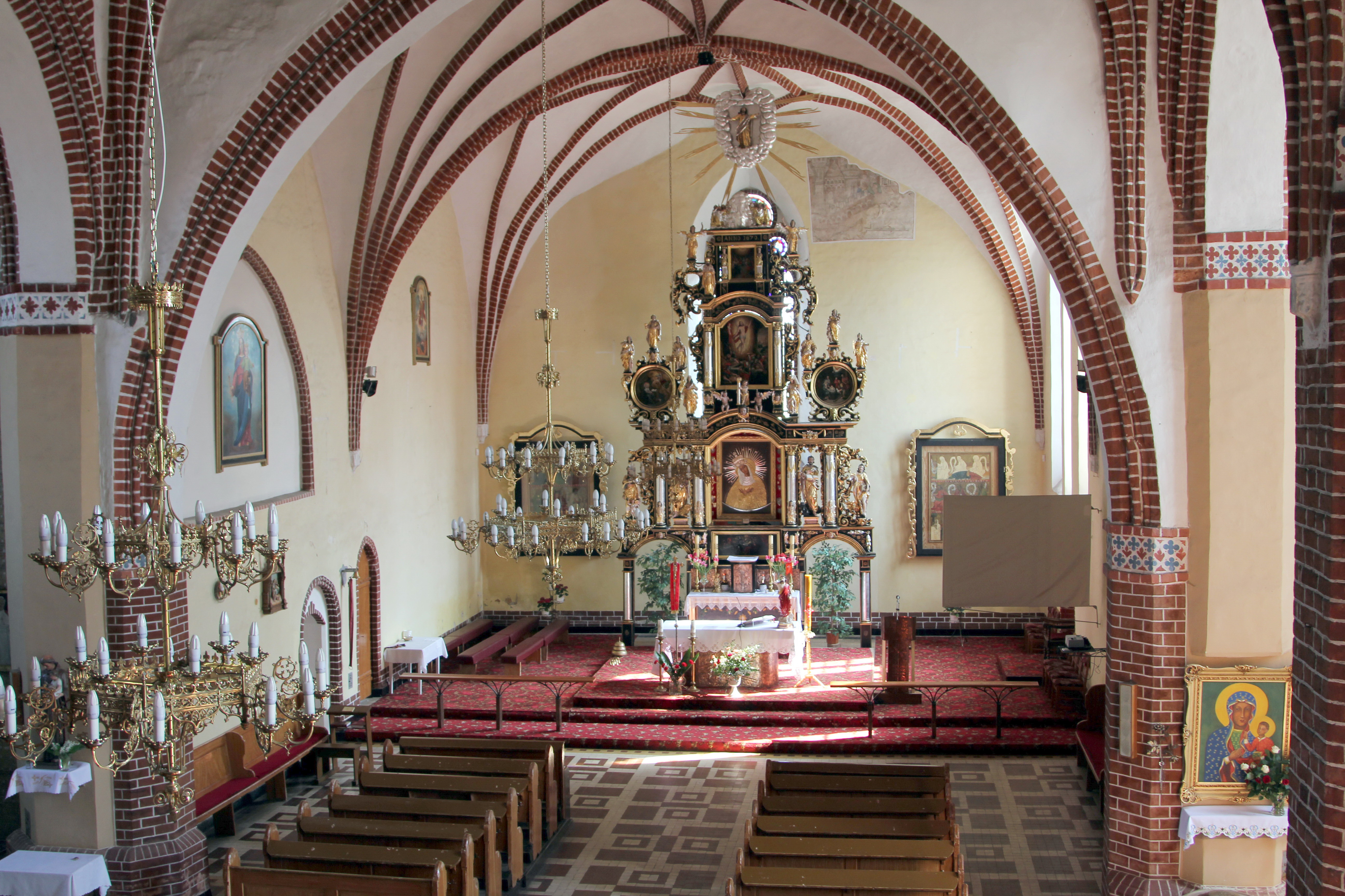 Nawa Główna w kościele św. Michała Archanioła w Sępopolu.